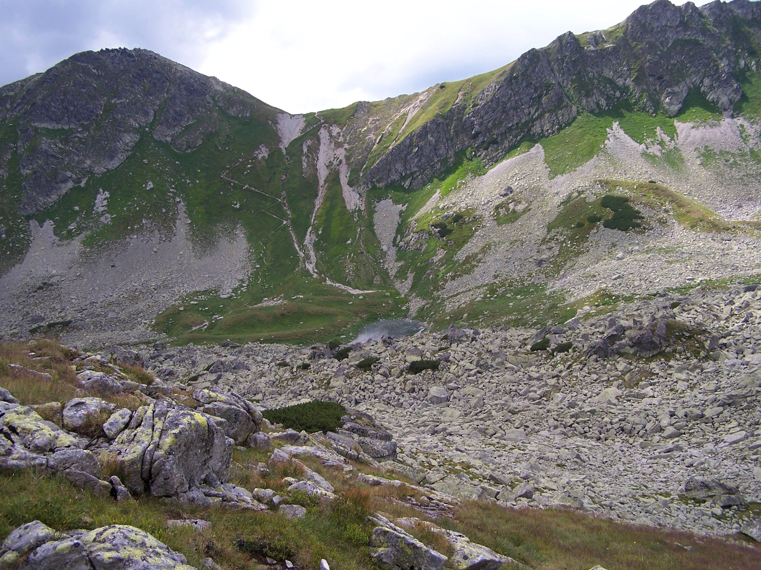 Gładki Wierch, Gładka Przełęcz {High Tatra Mountains)